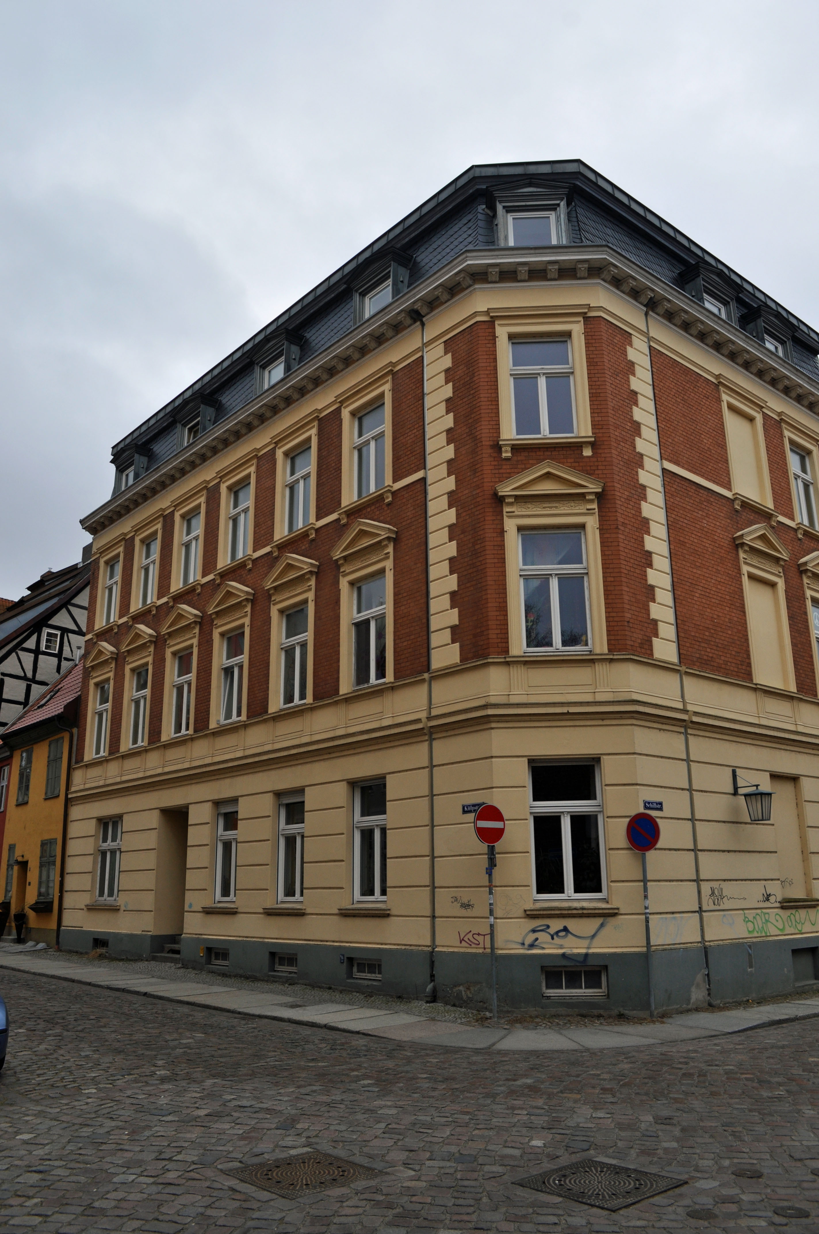 Gebäude bzw. Gebäudedetail in Stralsund. Straße und Hausnummer siehe Dateiname.